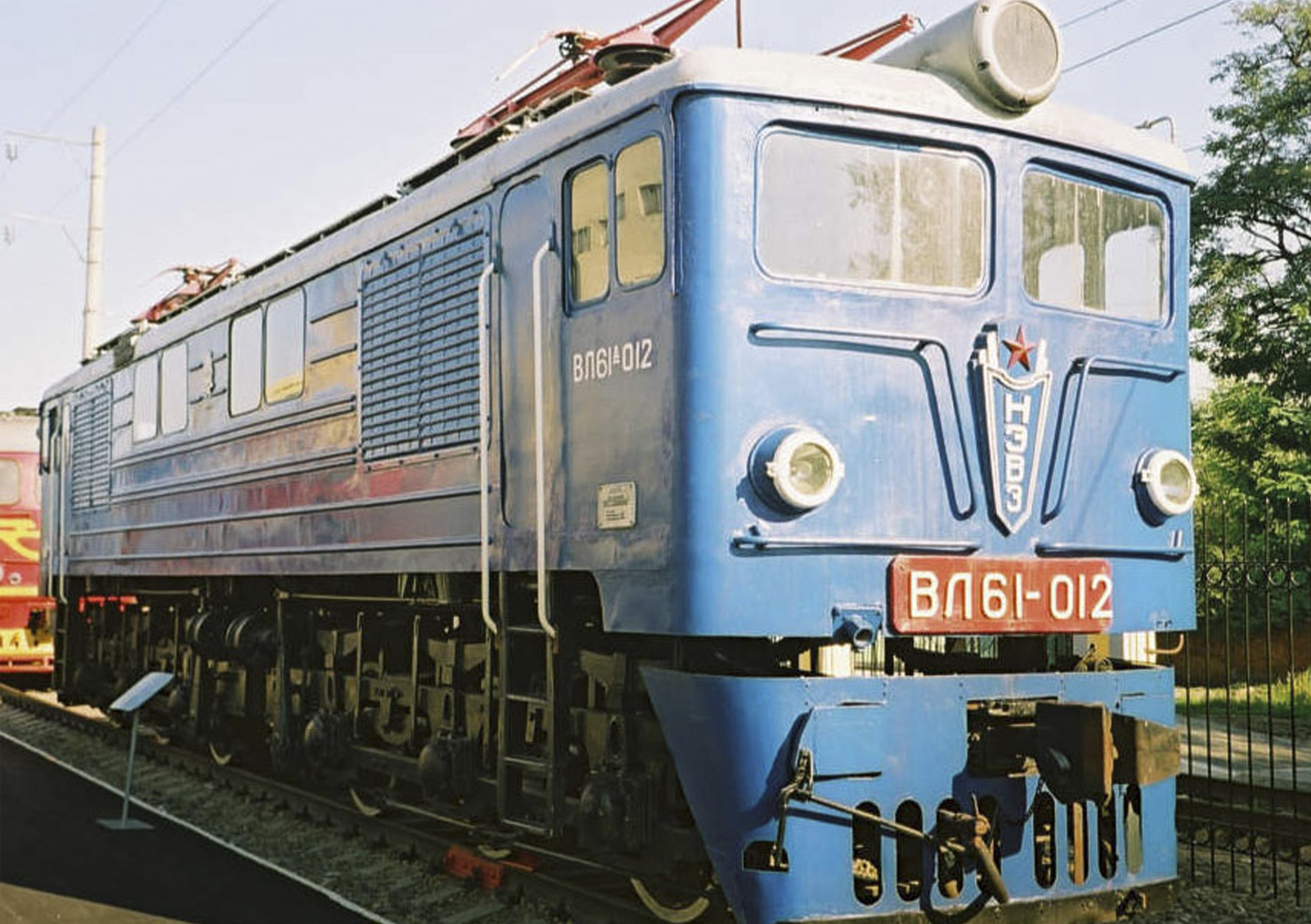 Электровоз построен в 1957 году Новочеркасским электровозостроительным заводом